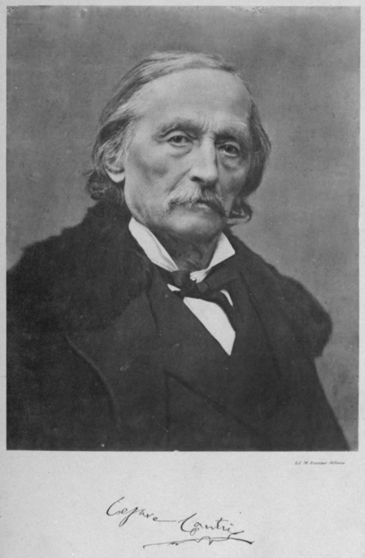 Ritratto di Cesare Cantù (1804-1895)